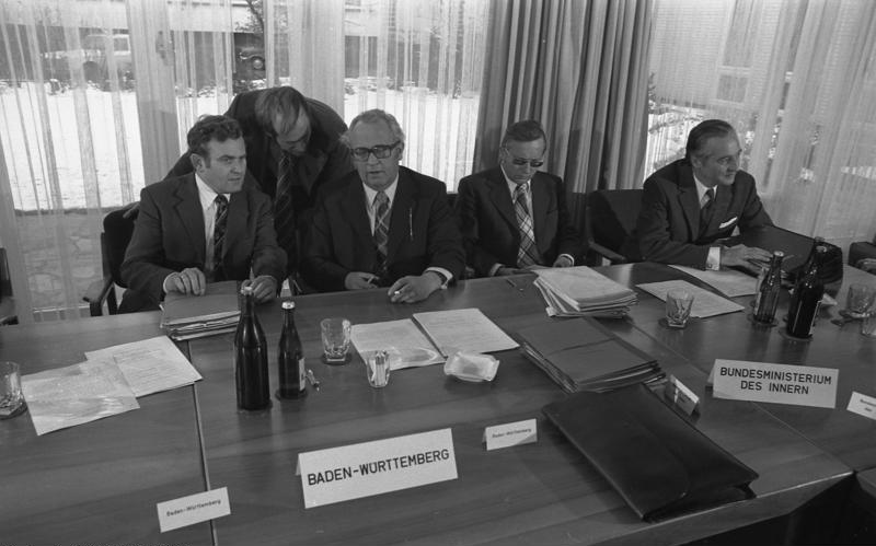 Innenministerkonferenz der Länder in der Bayerischen Landesvertretung. Von links Staatssekretär Teufel (Baden-Württemberg), Oberregierungsrat Dr. Bartholomé (Rheinland-Pfalz), Innenminister Schiess (Baden-Württemberg), Ministerialdirigent Dr. Stümper (Baden-Württemberg), Staatssekretär Dr. Rutschke (Bundesministerium des Innern)